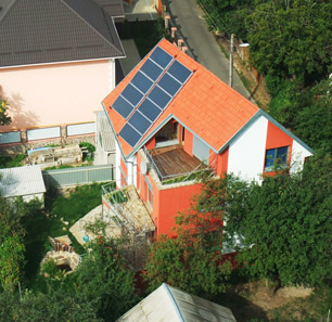 Das erste Passivhaus in der Ukraine